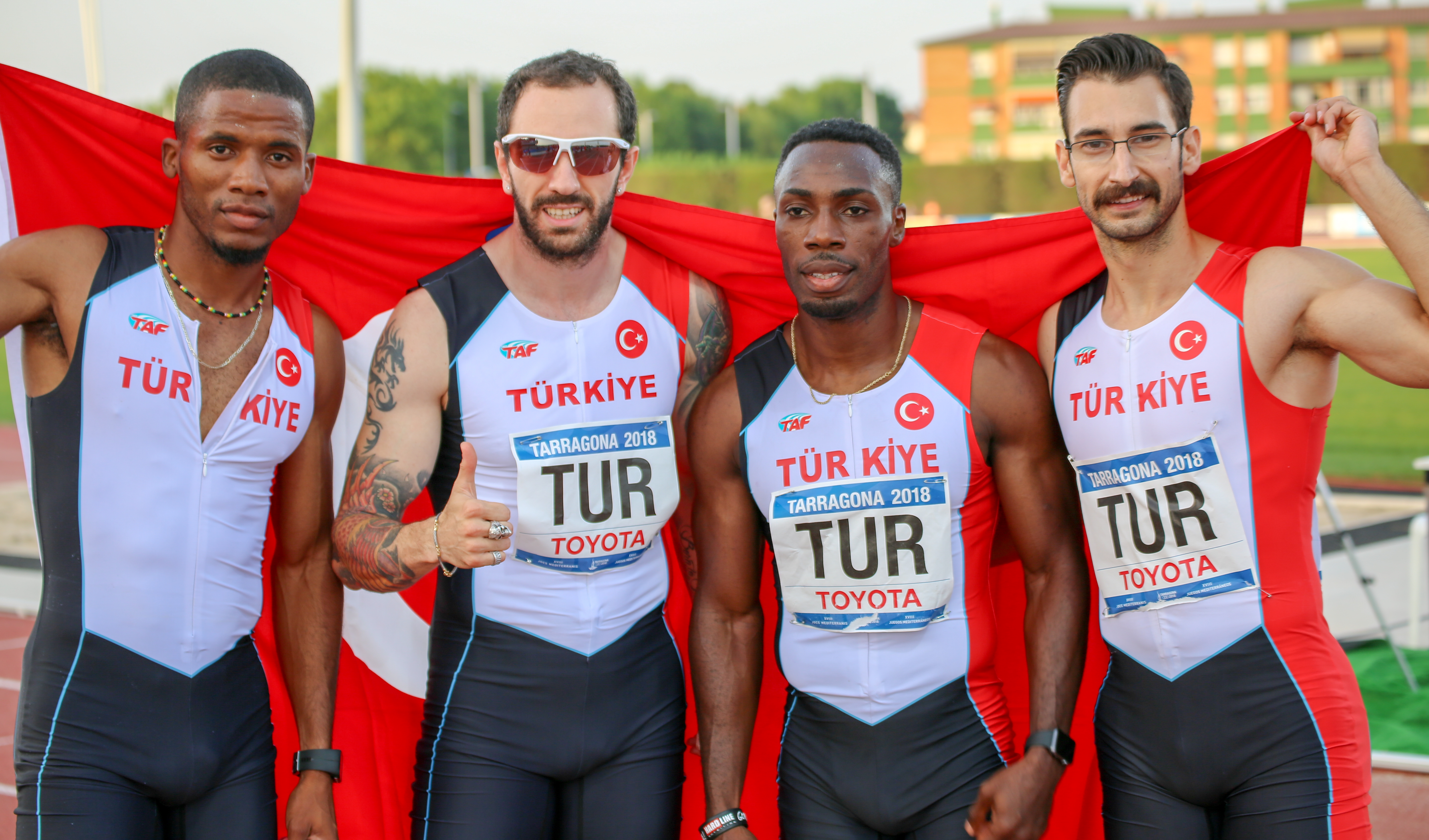 Turquía en los relevos 4x100 en los Juegos del Mediterráneo 2018 (Emre Zafer Barnes, Jak Ali Harvey, Yiğitcan Hekimoğlu, Ramil Guliyev)